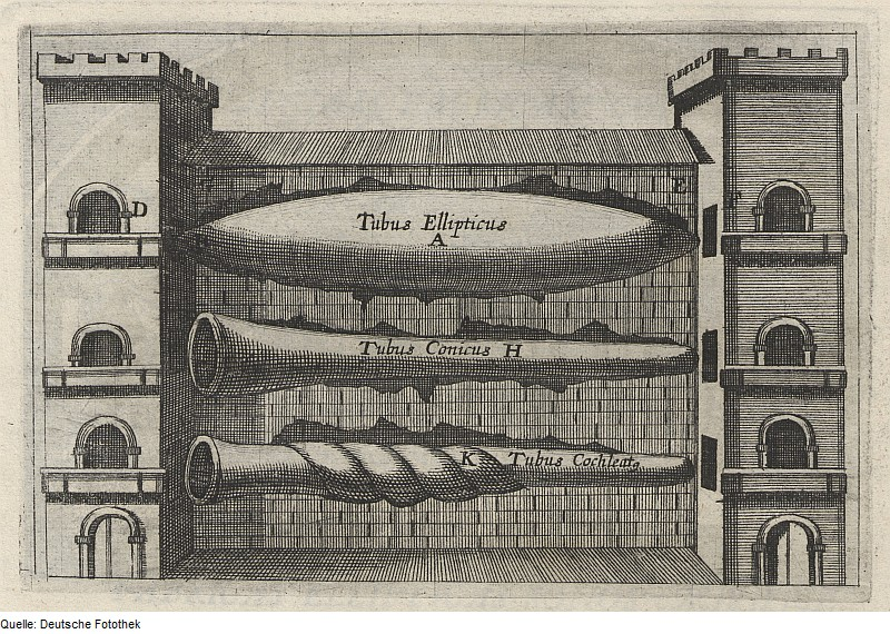 Original image description from the Deutsche Fotothek Akustik & Schall & Gebäude & Röhre